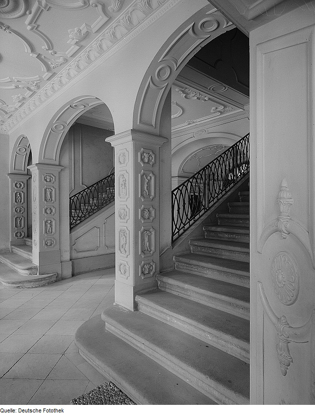 Original image description from the Deutsche Fotothek Radebeul. Schloß Wackerbarth, Treppenhaus Erdgeschoß